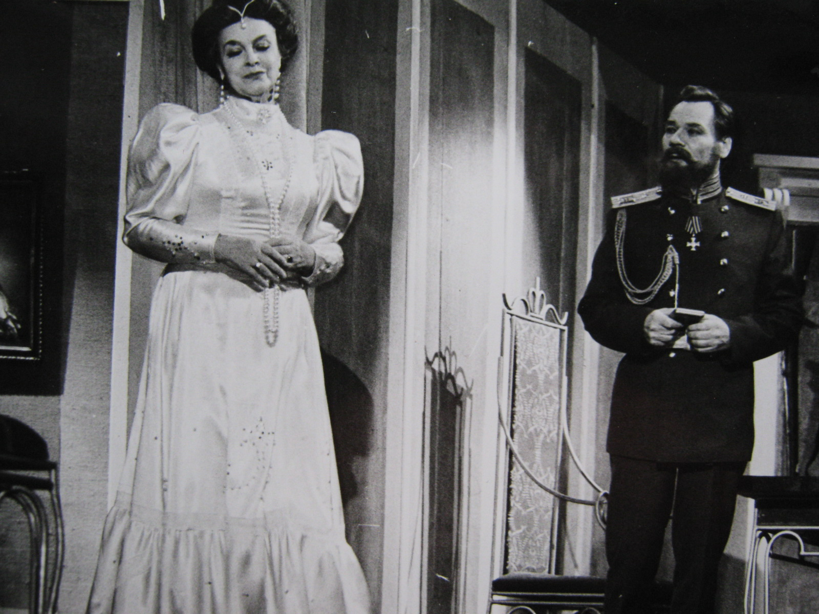 Сцена из спектакля «Гришка Распутин» Санкт-Петербургского драматического театра «Патриот» РОСТО. Татьяна Пилецкая в роли императрицы Александры, Юрий Оськин в роли Николая II, режиссёр-постановщик Егоров Геннадий Семёнович